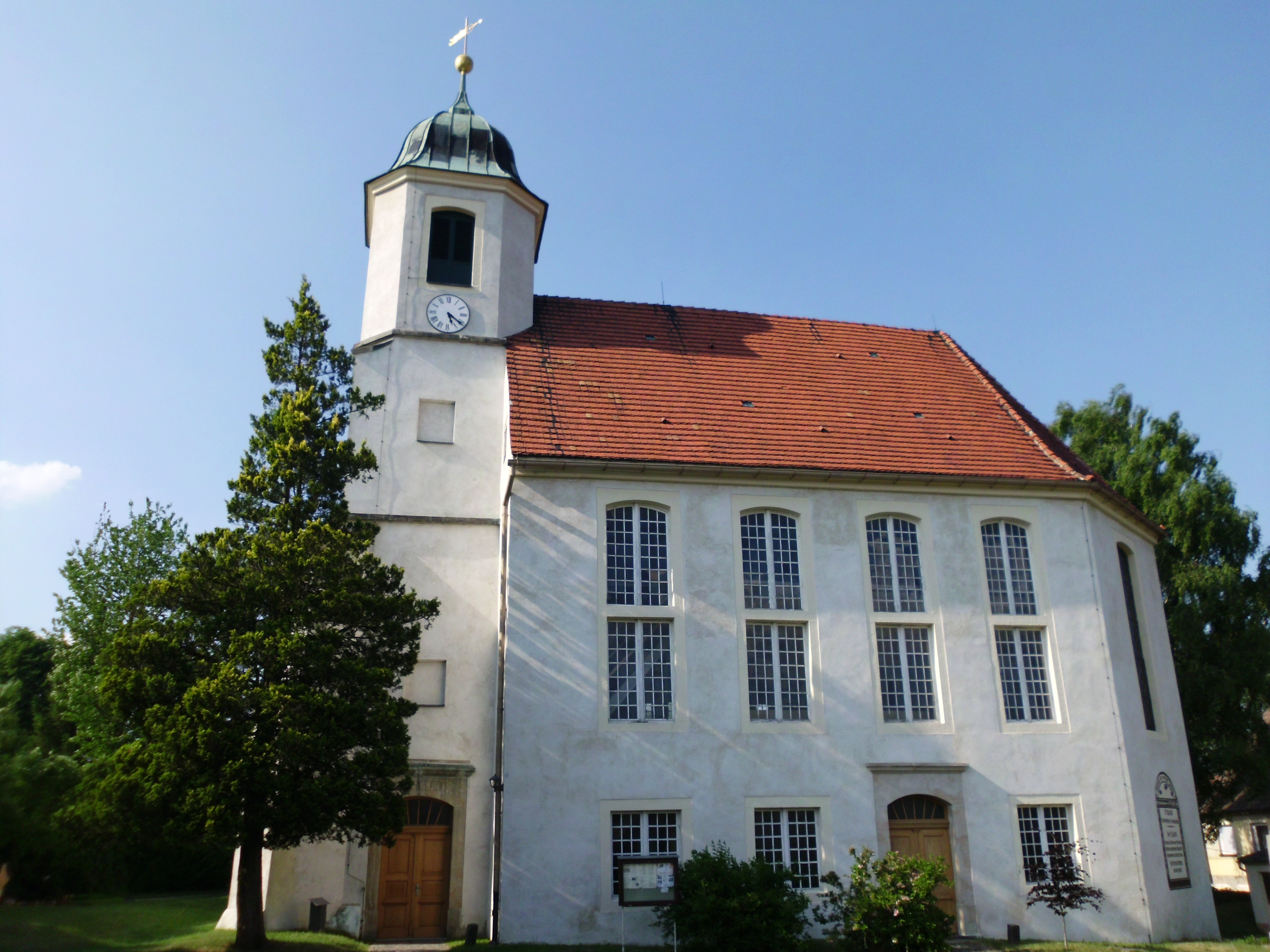 St. Michaelis-Kirche in Schmiedefeld. Vermutlicher Vorgänger war eine Wallfahrtskirche aus dem 13. Jahrhundert. 1813 im Befreiungskrieg mit dem größten Teil des Dorfes abgebrannt, 1818 wurde der Neubau an gleicher Stelle geweiht